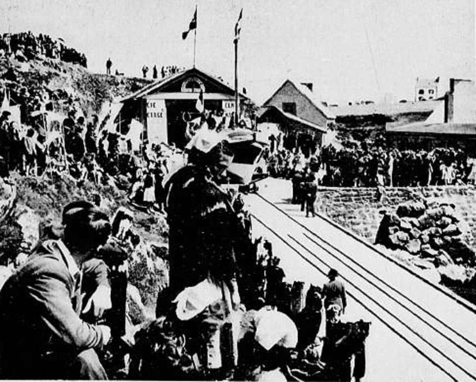 Ouessant : l'inauguration de la station de sauvetage de Lampaul en 1938 (Annales du sauvetage maritime, 1938